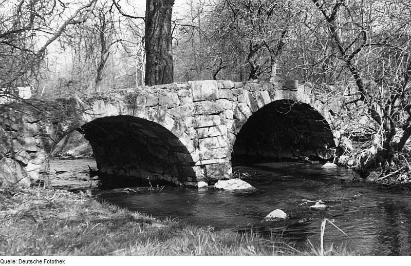 Original image description from the Deutsche FotothekKlipphausen-Lampersdorf. Kirstenmühle, steinerne Doppelbogenbrücke zur Mühle